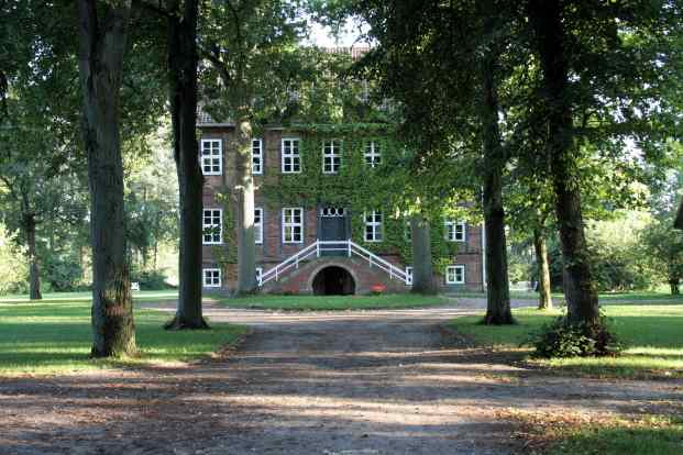 Rittergut Eversen I